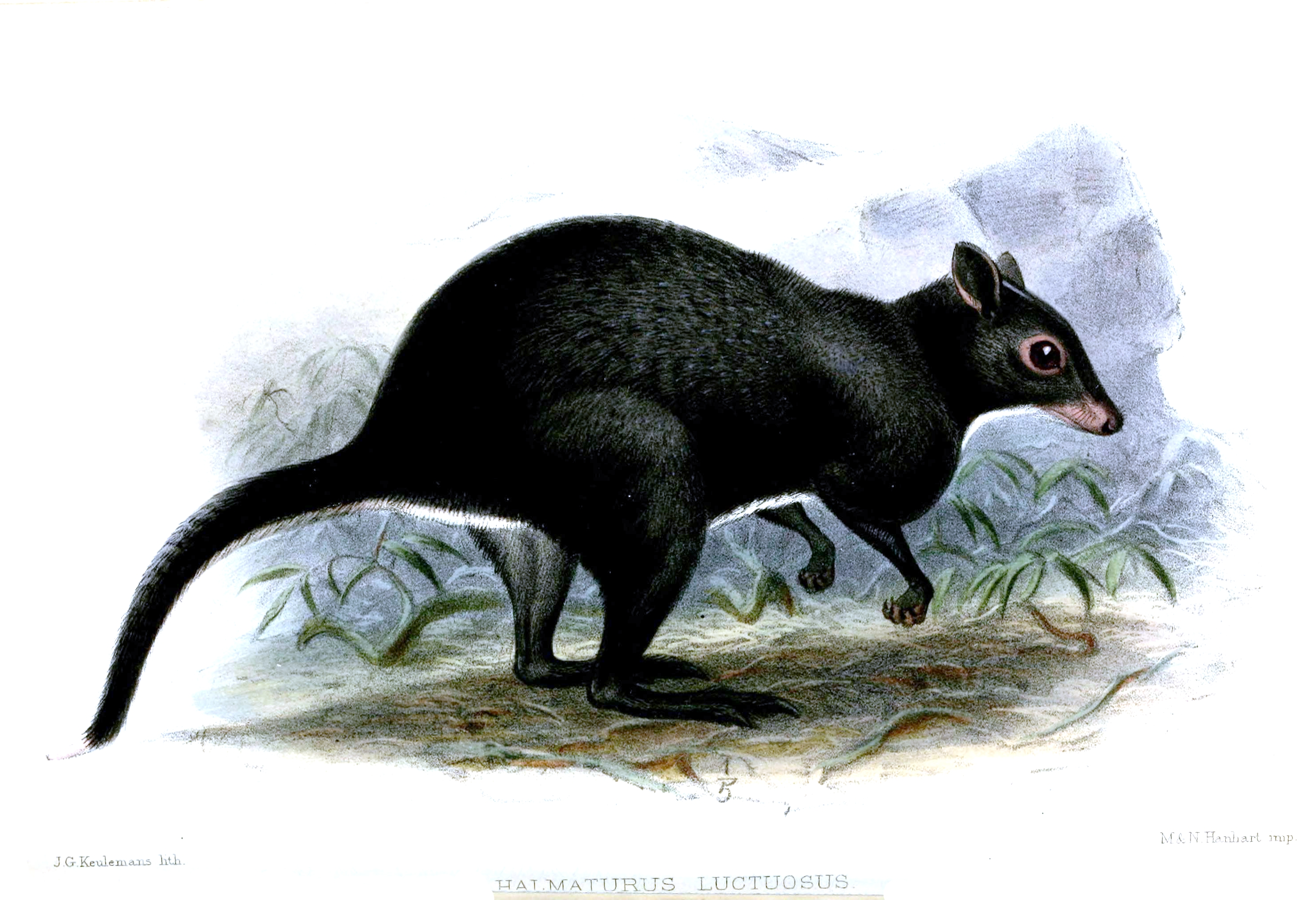 Halmaturus luctuosus = Dorcopsis luctuosa